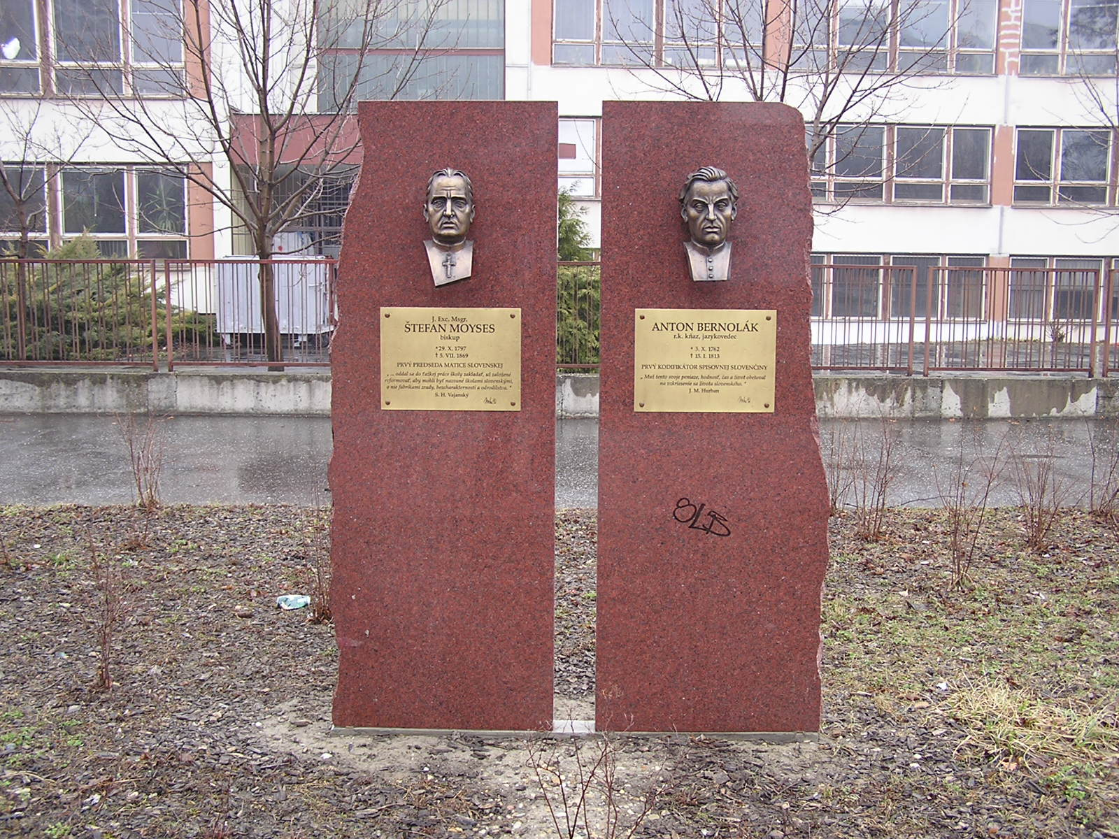 Pamätná tabuľa Štefana Moysesa a Antona Bernoláka na Petržalskom korze